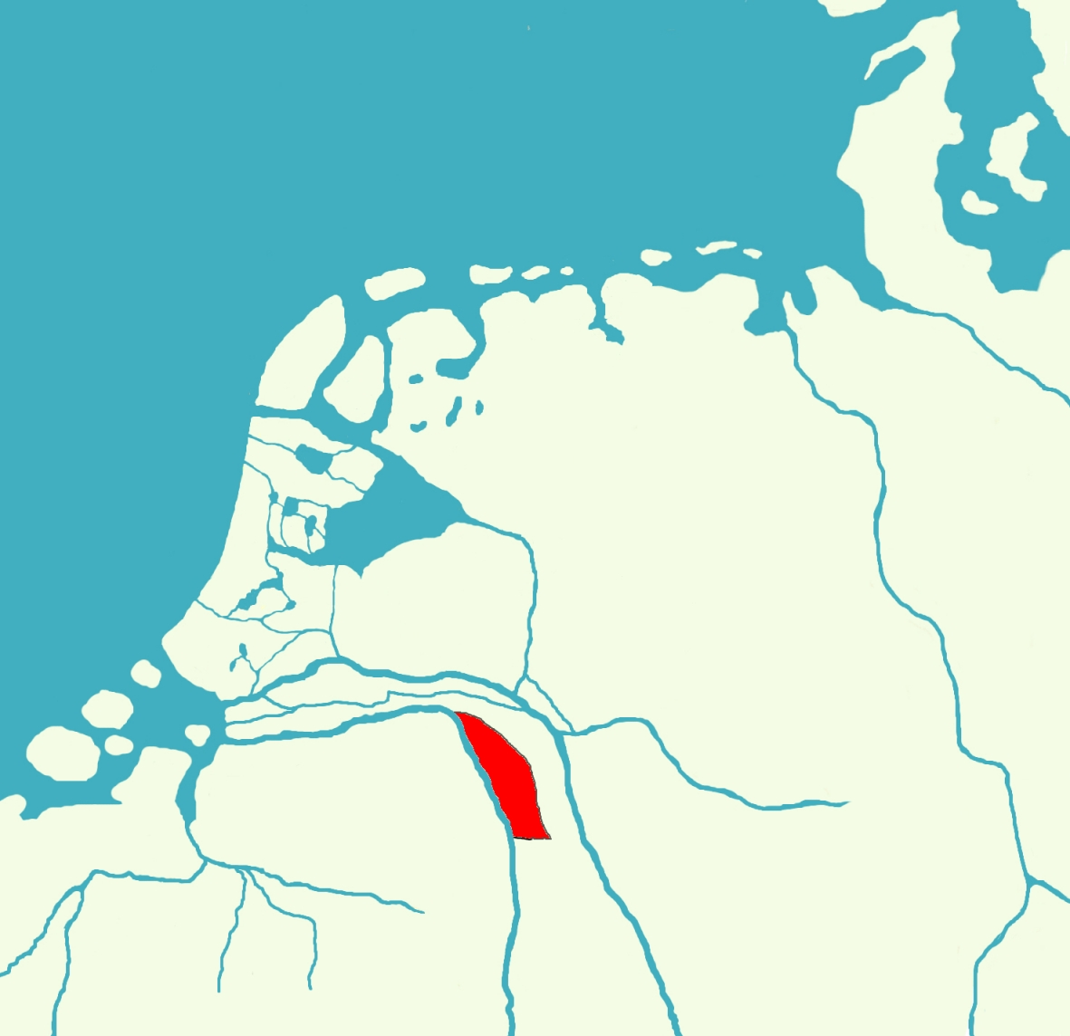 Eigen werk. Ligging van de Mulgouw in het Frankische Rijk. Gemaakt door Sindala op 28 maart 2007. 2e versie